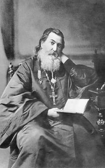 Фотография прот. Валентина Амфитеатрова, сделанная, очевидно, в конце 19 в. Срок давности давно истёк.